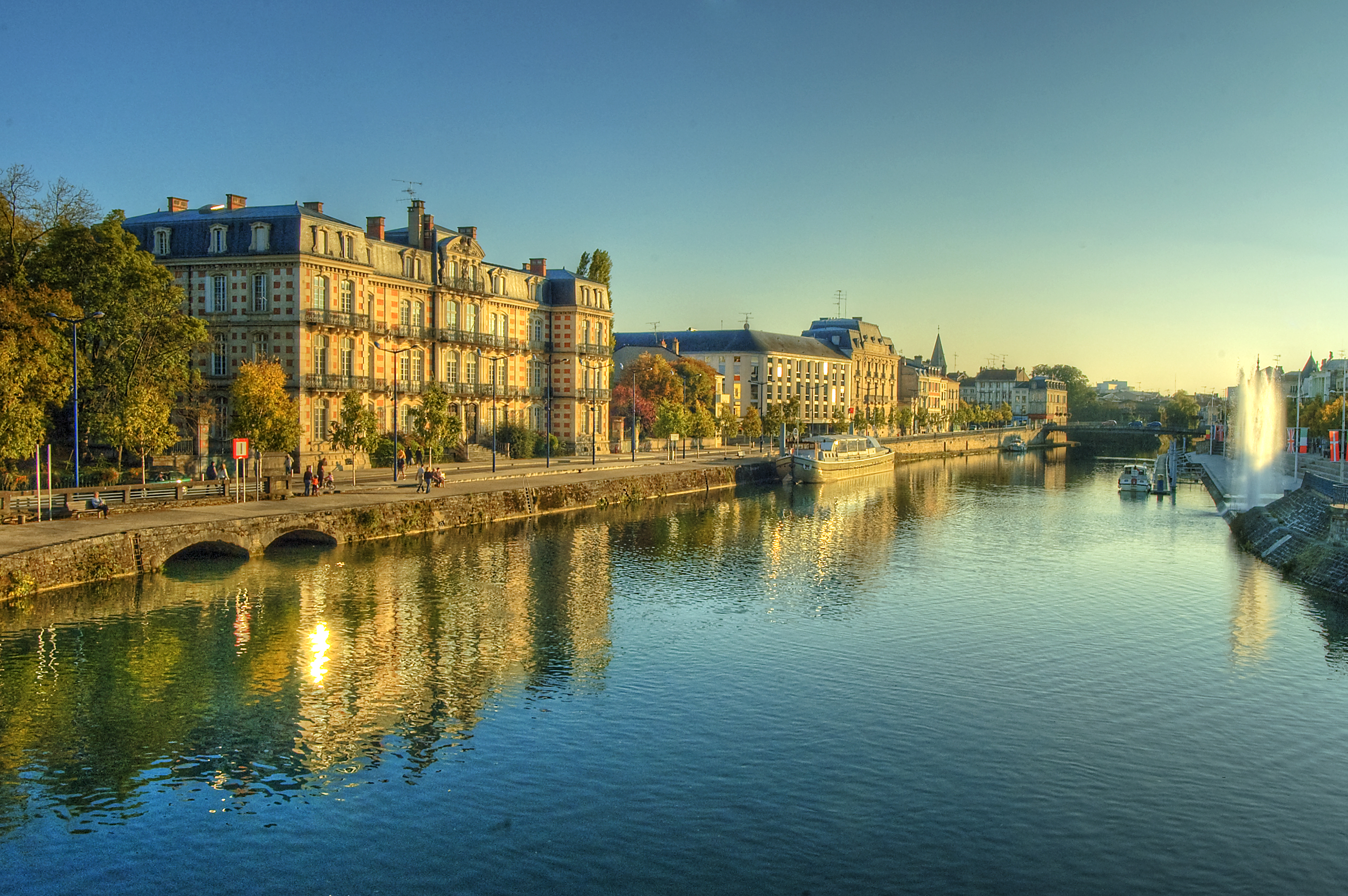 Klick here for a large view! Verdun (deutsch mittelalterlich Wirten, zeitweise auch deutsch Verden (Maas)) ist eine Stadt an der Maas (frz. la Meuse) im Nordosten Frankreichs mit etwa 23.000 Einwohnern. Verdun ist Sitz einer Sous-Prefecture im Département Meuse (55) und gehört zur Region Lothringen (frz. Lorraine). Paris ist 260 km entfernt, Metz 80 km, Nancy 90 km. Die Stadt wird auch vom Schifffahrtskanal Canal de la Meuse (früher: Canal de l'Est, branche Nord) erschlossen, der durch die kanalisierte Maas gebildet wird. From Wikipedia, the free encyclopedia